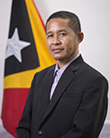 Alexandrino Cardoso da Cruz, Abgeordneter des Nationalparlaments Osttimors